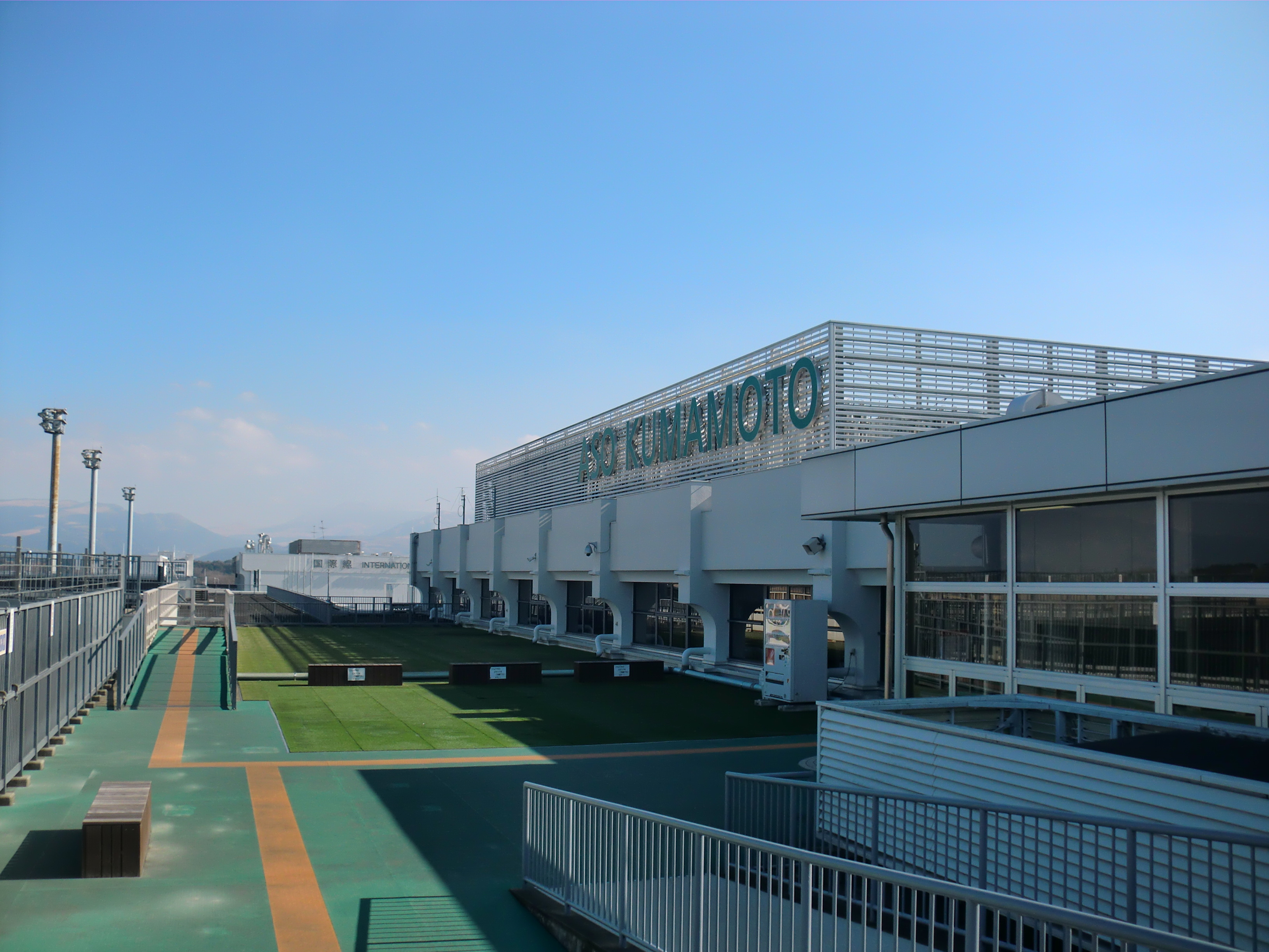 熊本空港3階展望デッキ